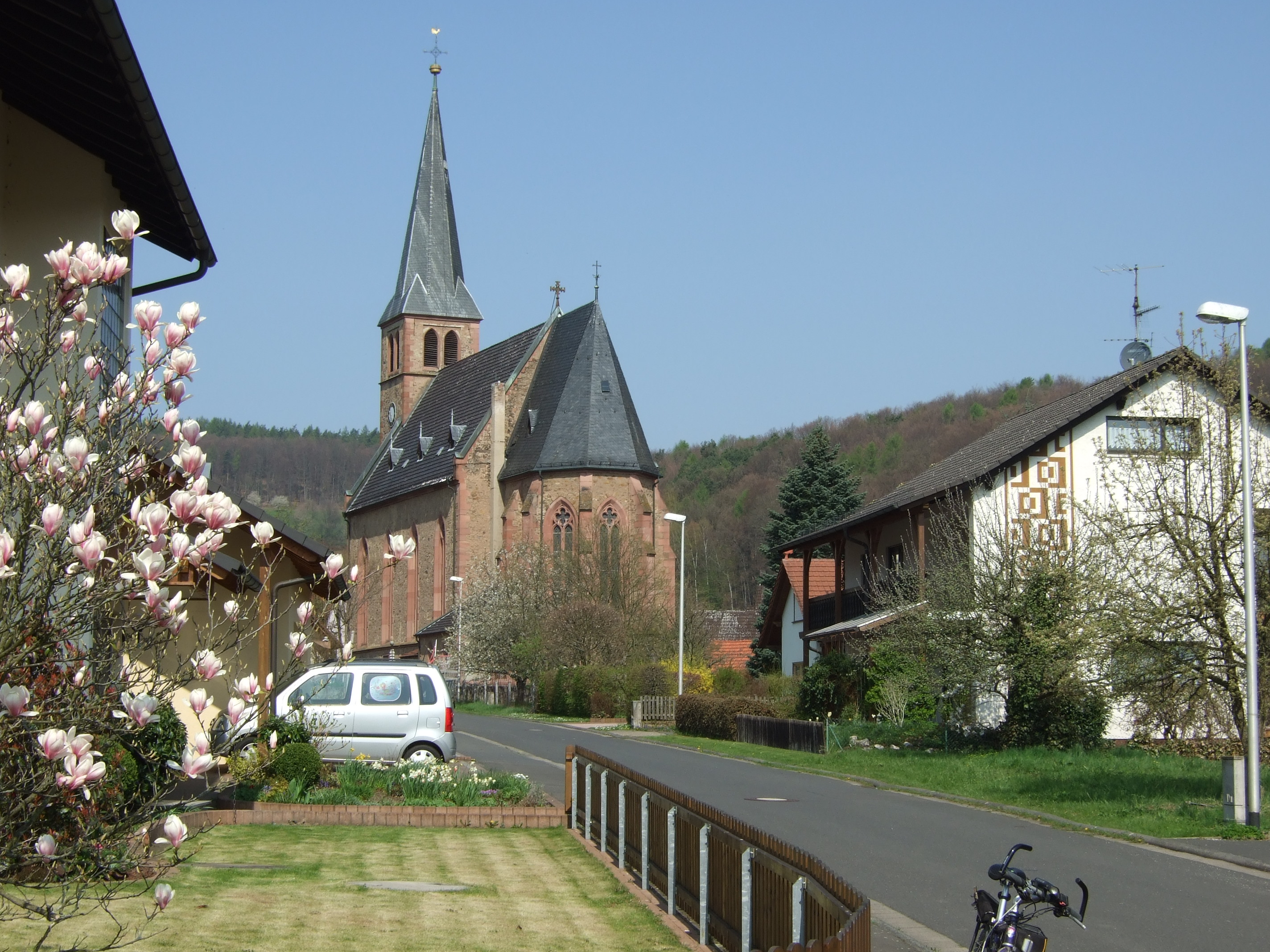 Die katholische St. Michael Pfarrkirche in Gunzenbach